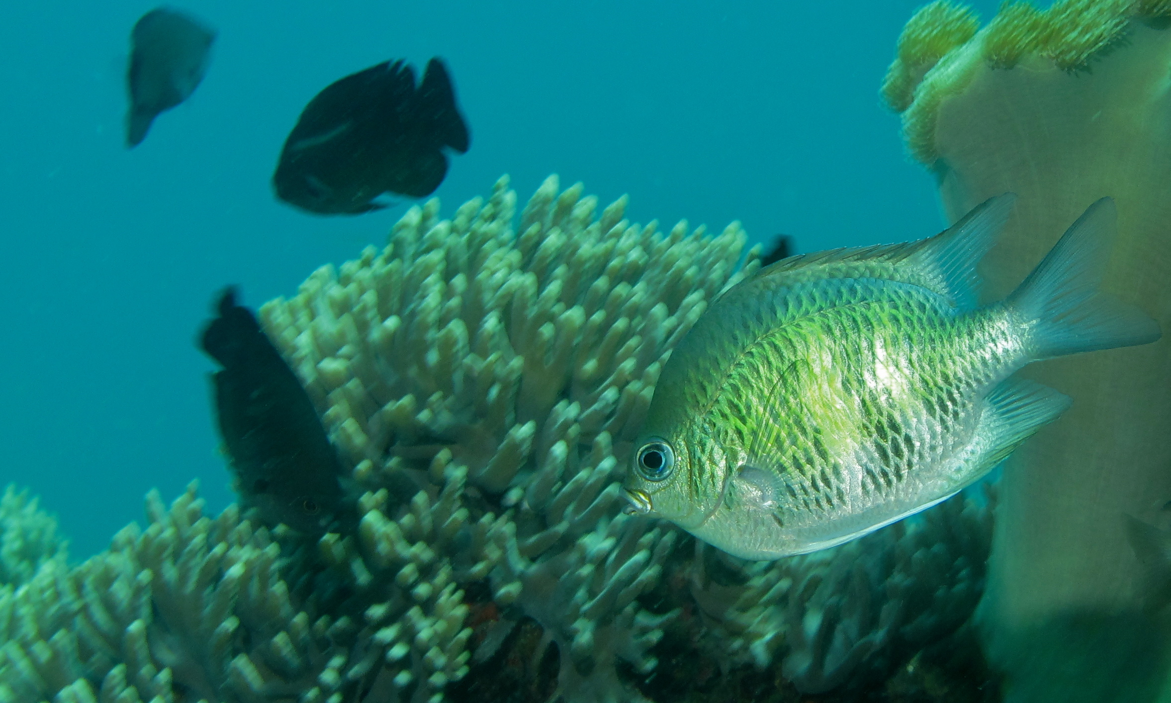 Tanjung Kubur, Lembeh Strait, Sulawesi, INDONESIA